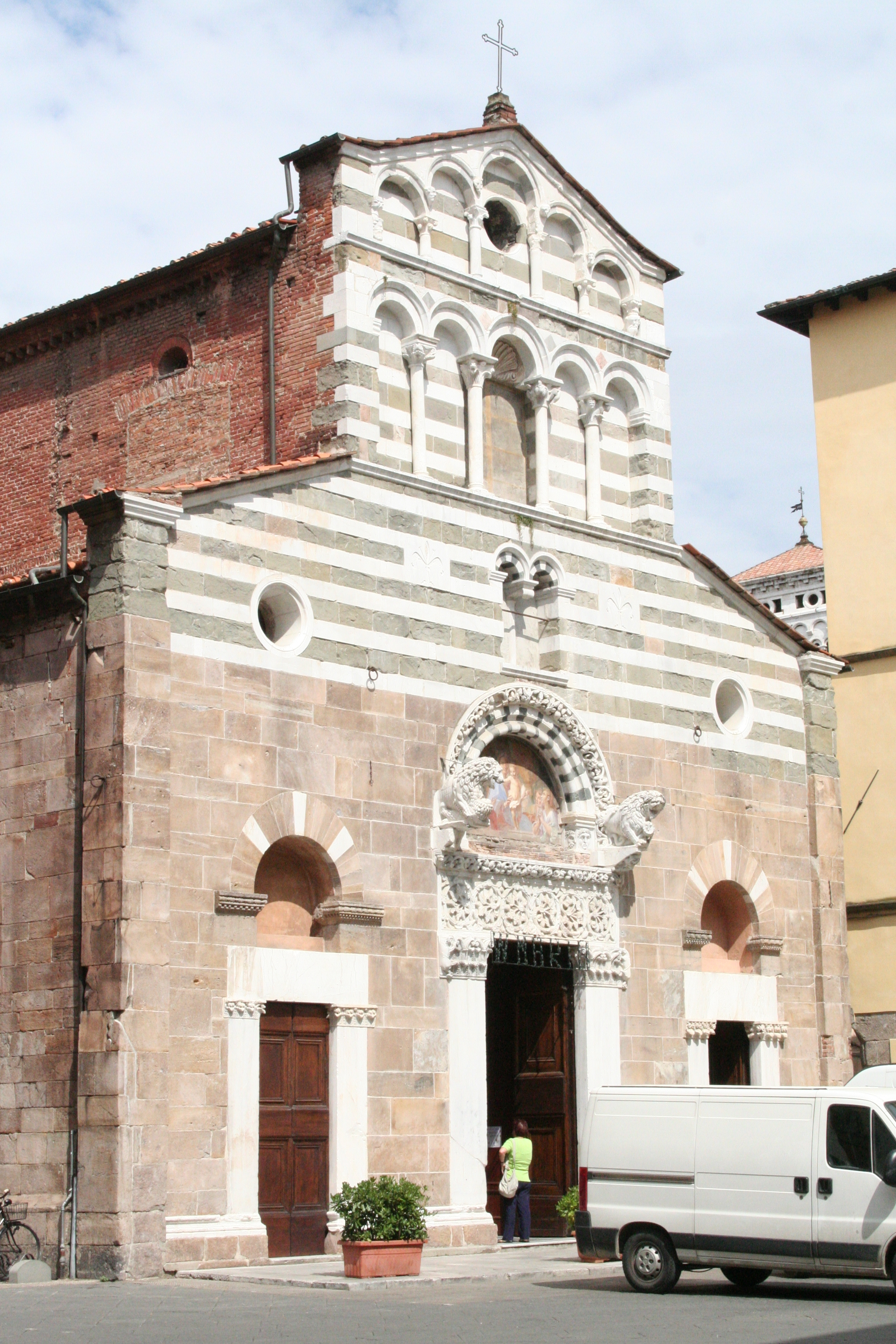 Chiesa di San Giusto di Lucca